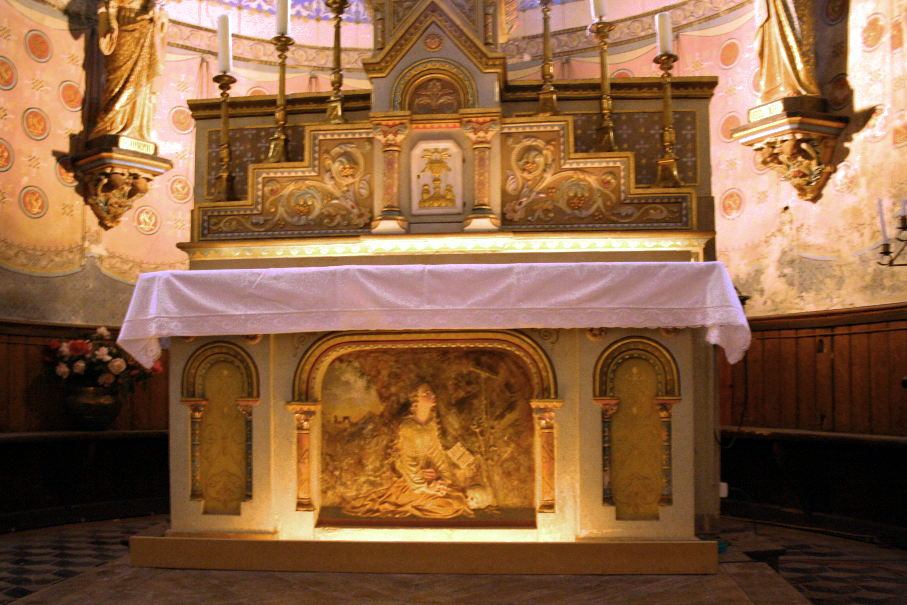 Eglise Sainte-Marie-Madeleine, Rennes-le-Château (Aude, Languedoc-Roussillon). Autel et décor intérieur de l'église réalisé entre 1887 et 1897 par l'abbé Saunière.